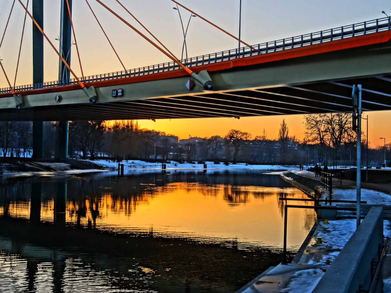 Trasa Uniwersytecka nad Brdą w Bydgoszczy